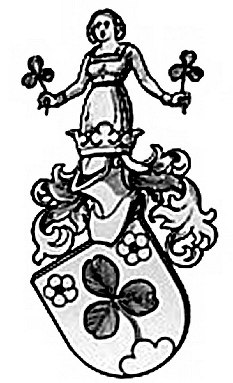 Familienwappen Buol (von Kaiserstuhl, Aargau)Blasonierung: In Rot auf grünem Dreiberg grünes Kleeblatt, im Haupt beseitet von zwei silbernen Rosen.